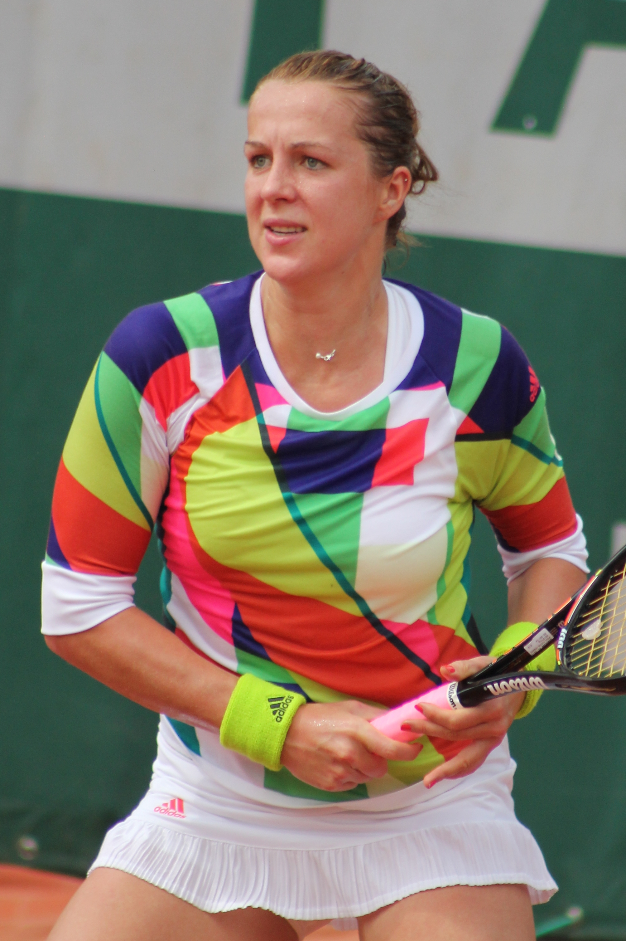 Pavlyuchenkova RG16 (14)